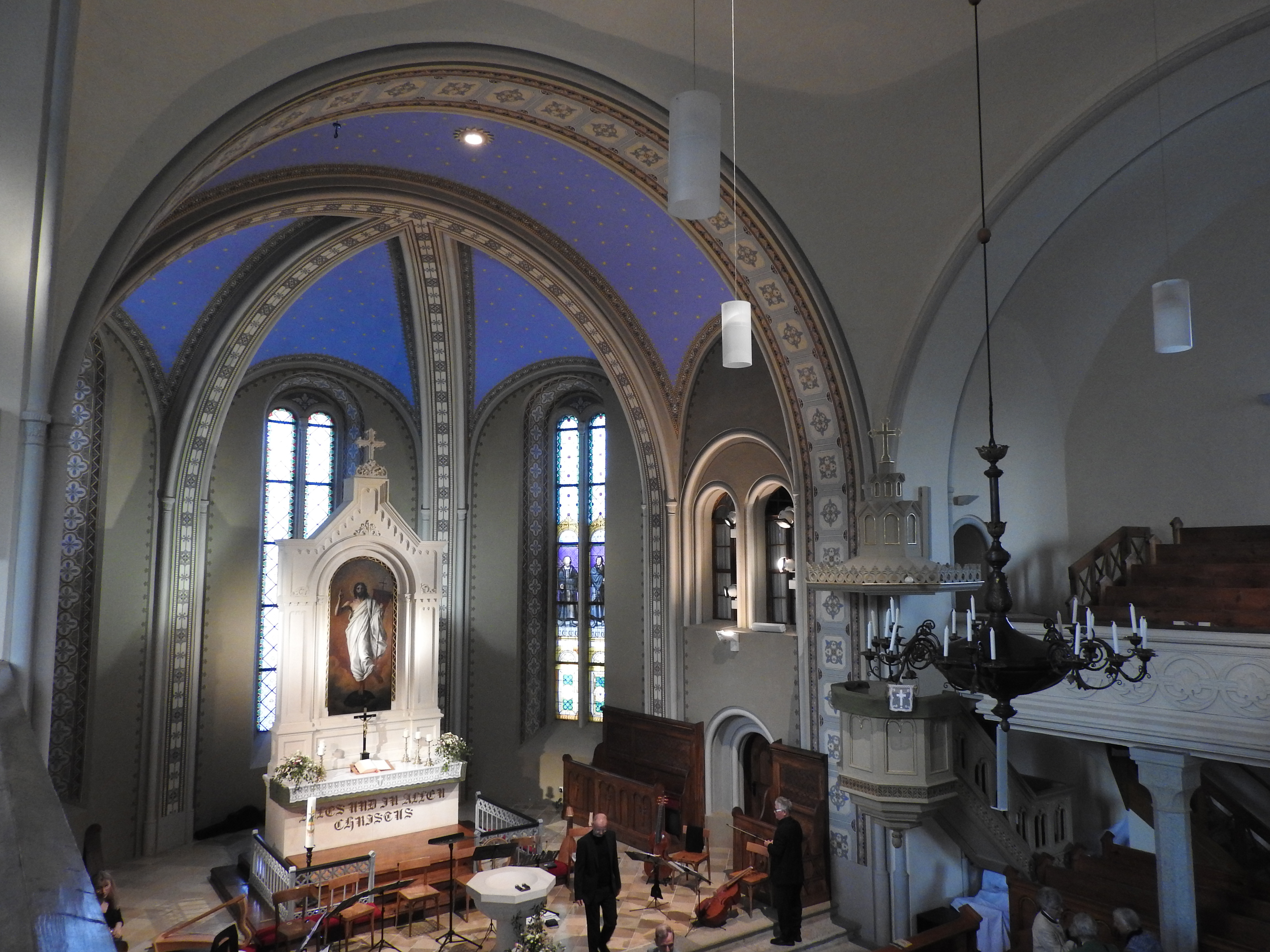 Die Dreieinigkeitskirche Wallern von innen